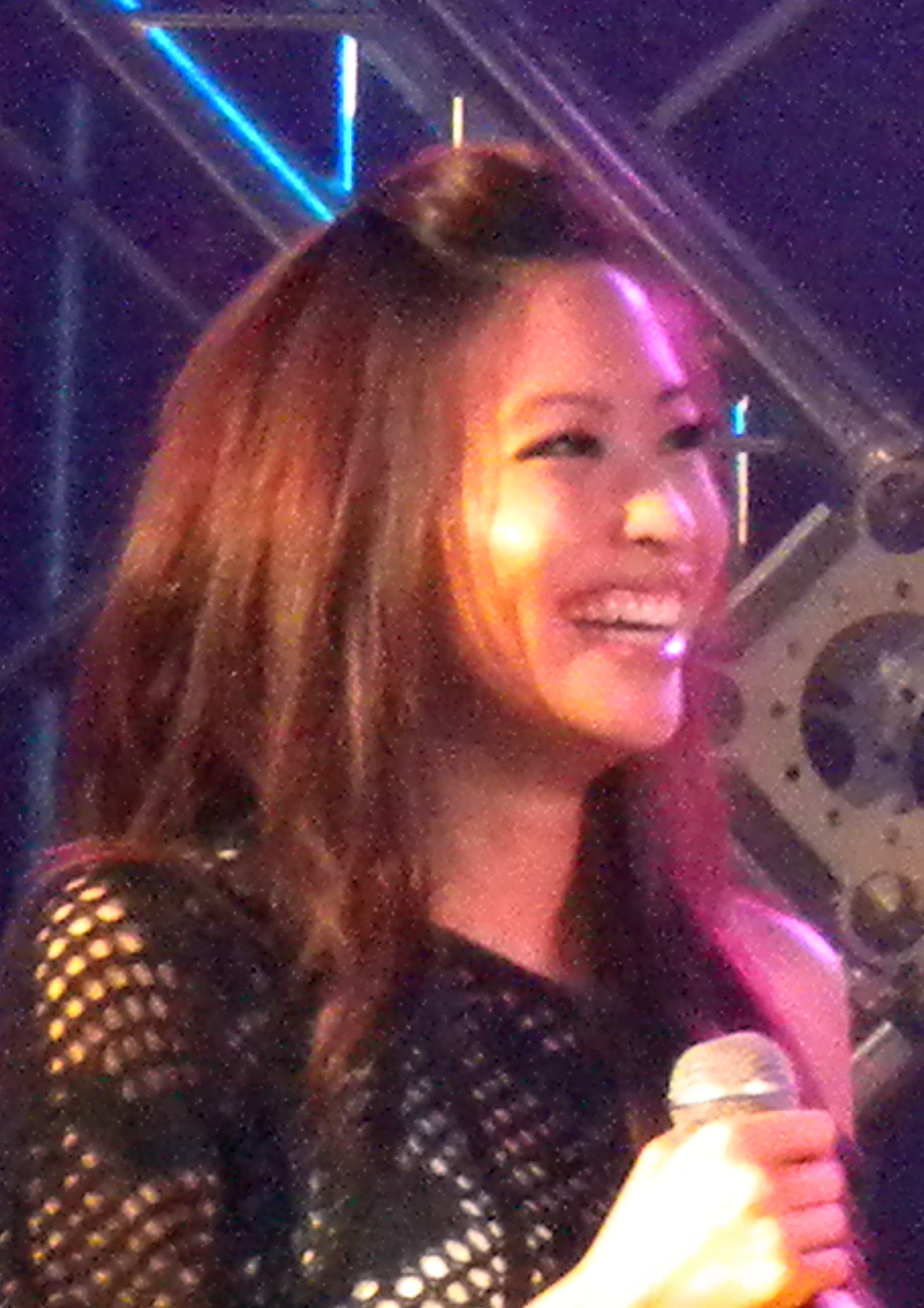 袁詠琳於2010年5月26日的南台科技大學"Beach"校園演唱會